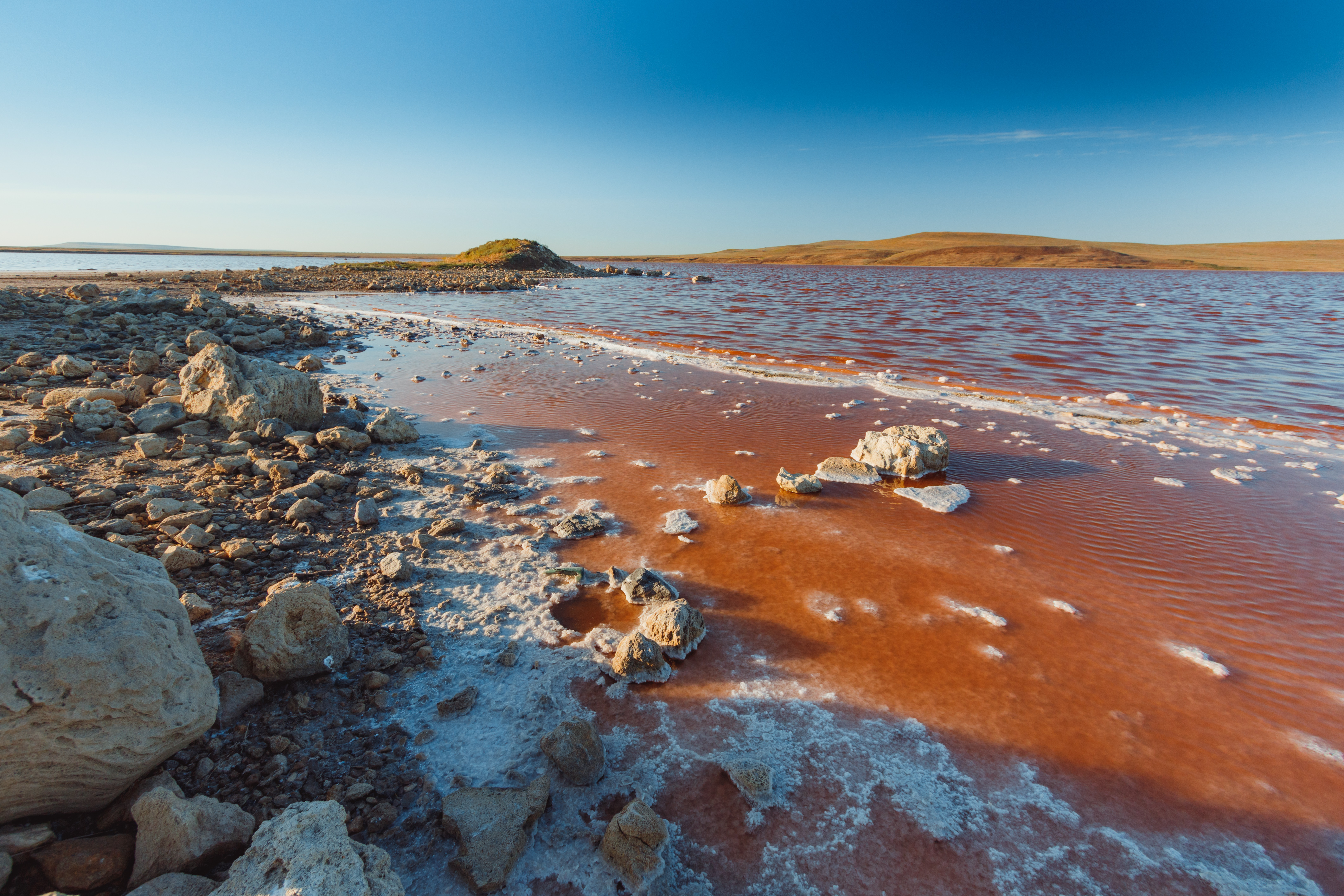 Опукский заповедник: ул. Черноморская, 1а (администрация). Сам заповедник западнее села, с. Яковенково, Ленинский район, Крым This object is located on the Crimean Peninsula and recognized as a protected area by both Russia and Ukraine under the ID: 8200003 / 01-227-5012, respectively. The legal status of the Crimean region is currently disputed.